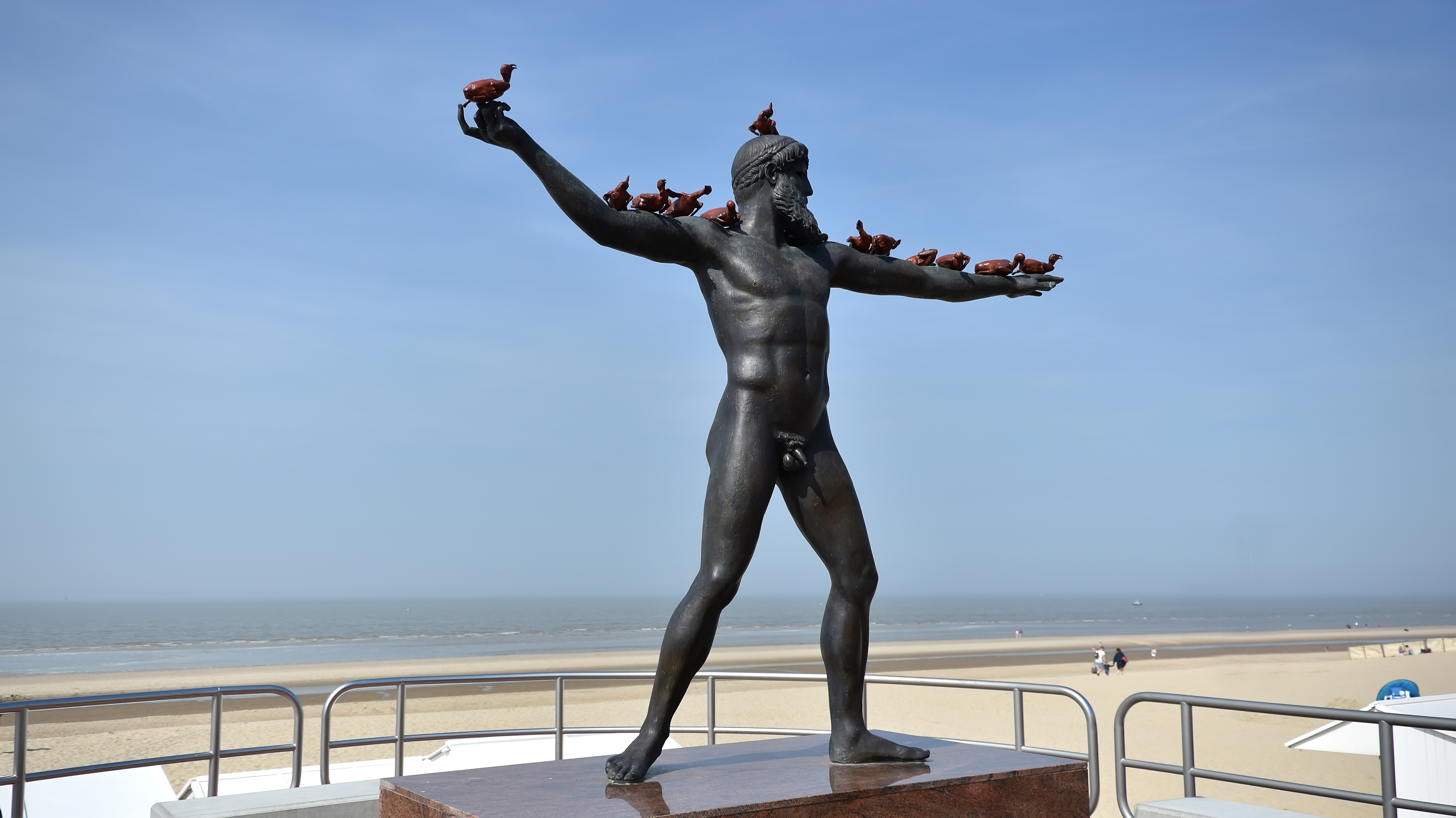 Xu Zhen (1977) - Eternity-Poseidon (2014) - De Haan